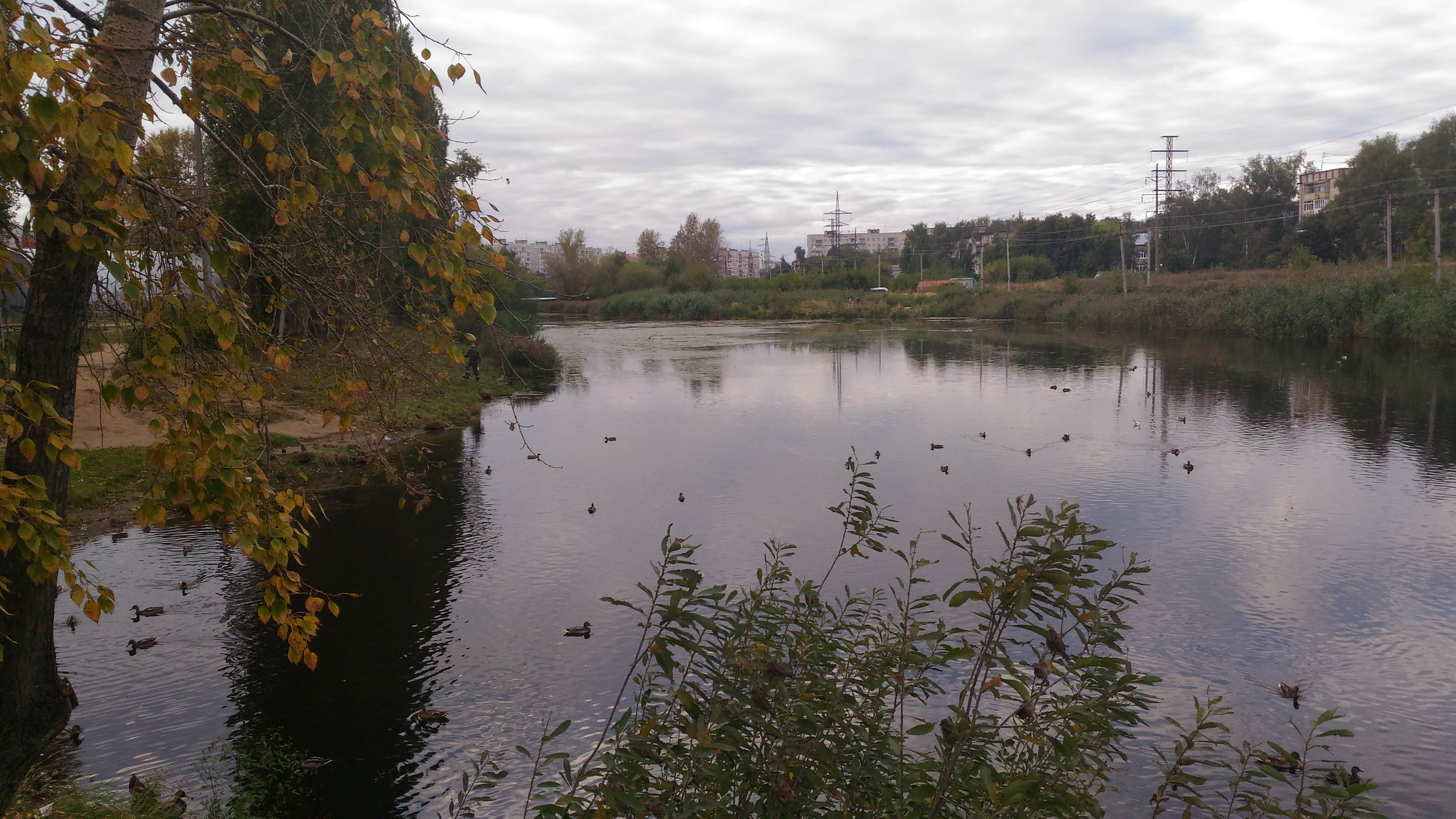 Нижний Новгород, река Левинка в Московском районе (ул. Красных зорь)